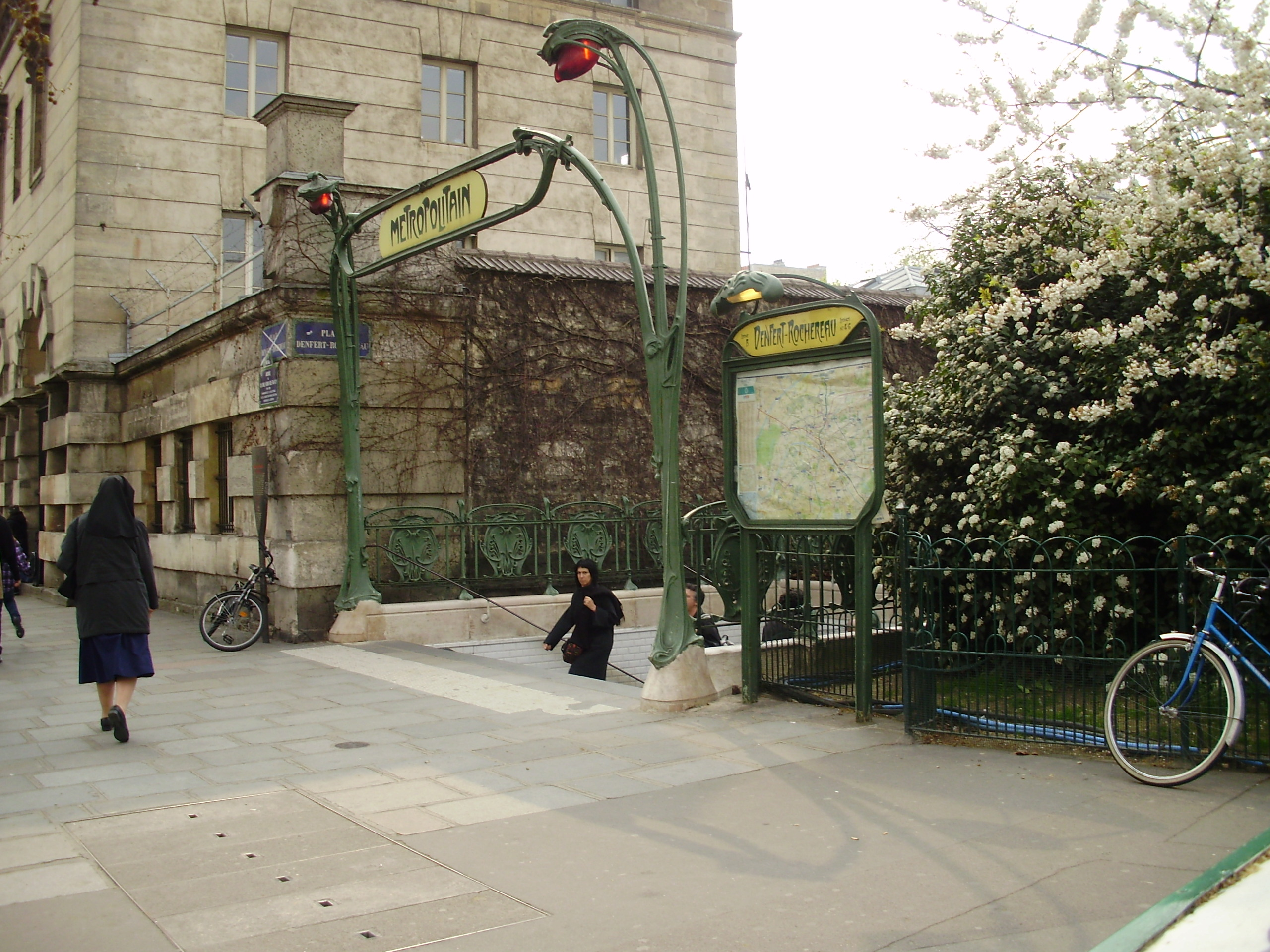 Entrée principale de la station Denfert-Rochereau du métro de Paris